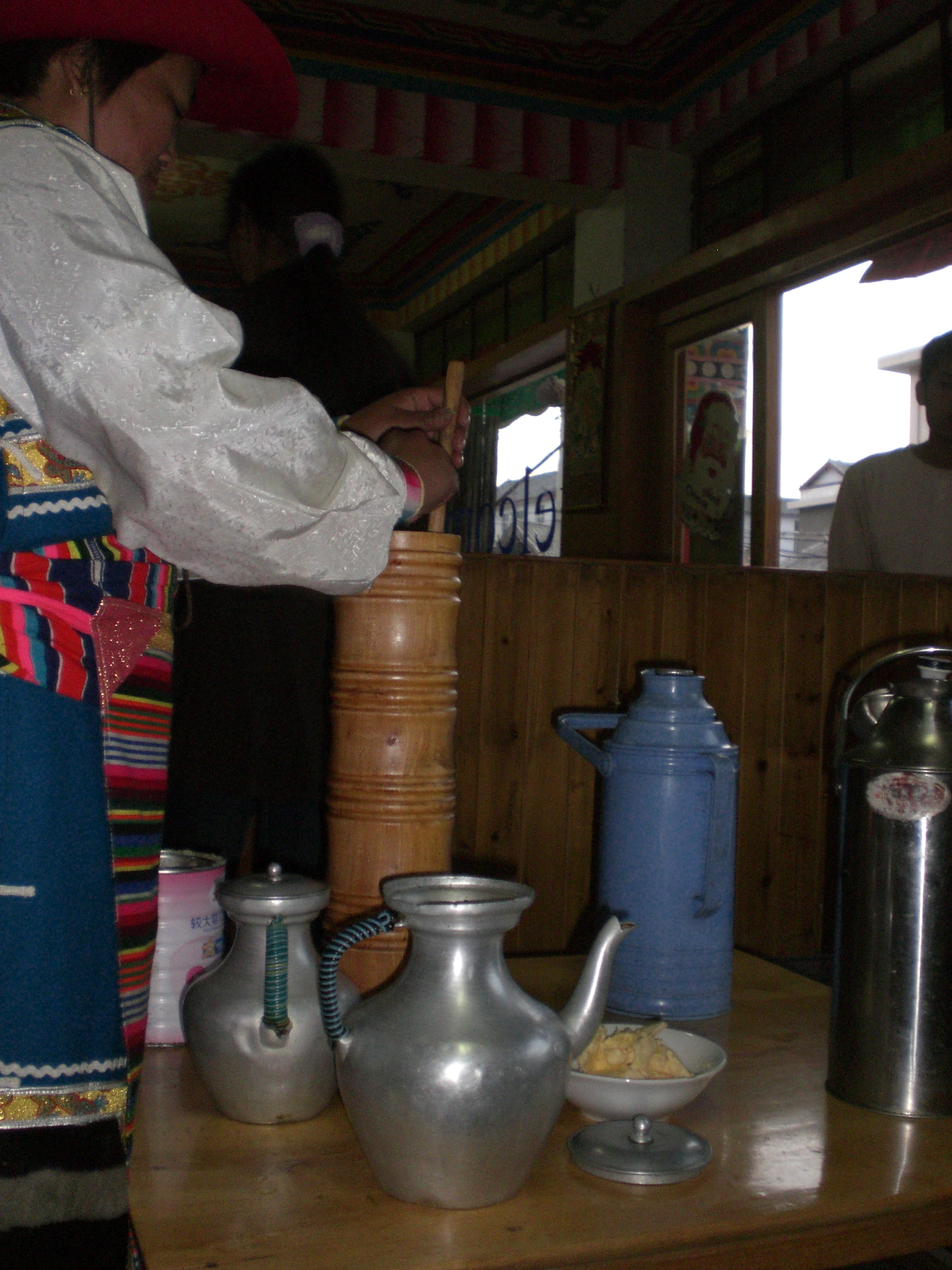 Lijiang, 2008, fabrication du thé au beurre de yack